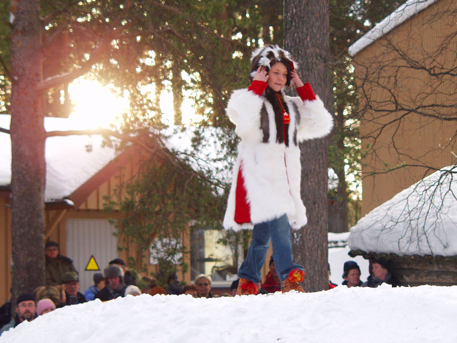 Modenschau beim Jokkmokksmarkt 2005